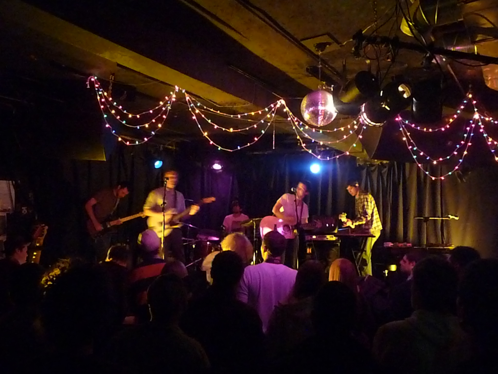 Bound Stems